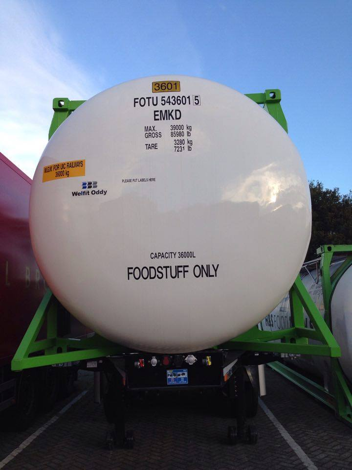 Az H&S egyik 30 tonna folyékony élelmiszer szállítására alkalmas tank konténere Magyarországon